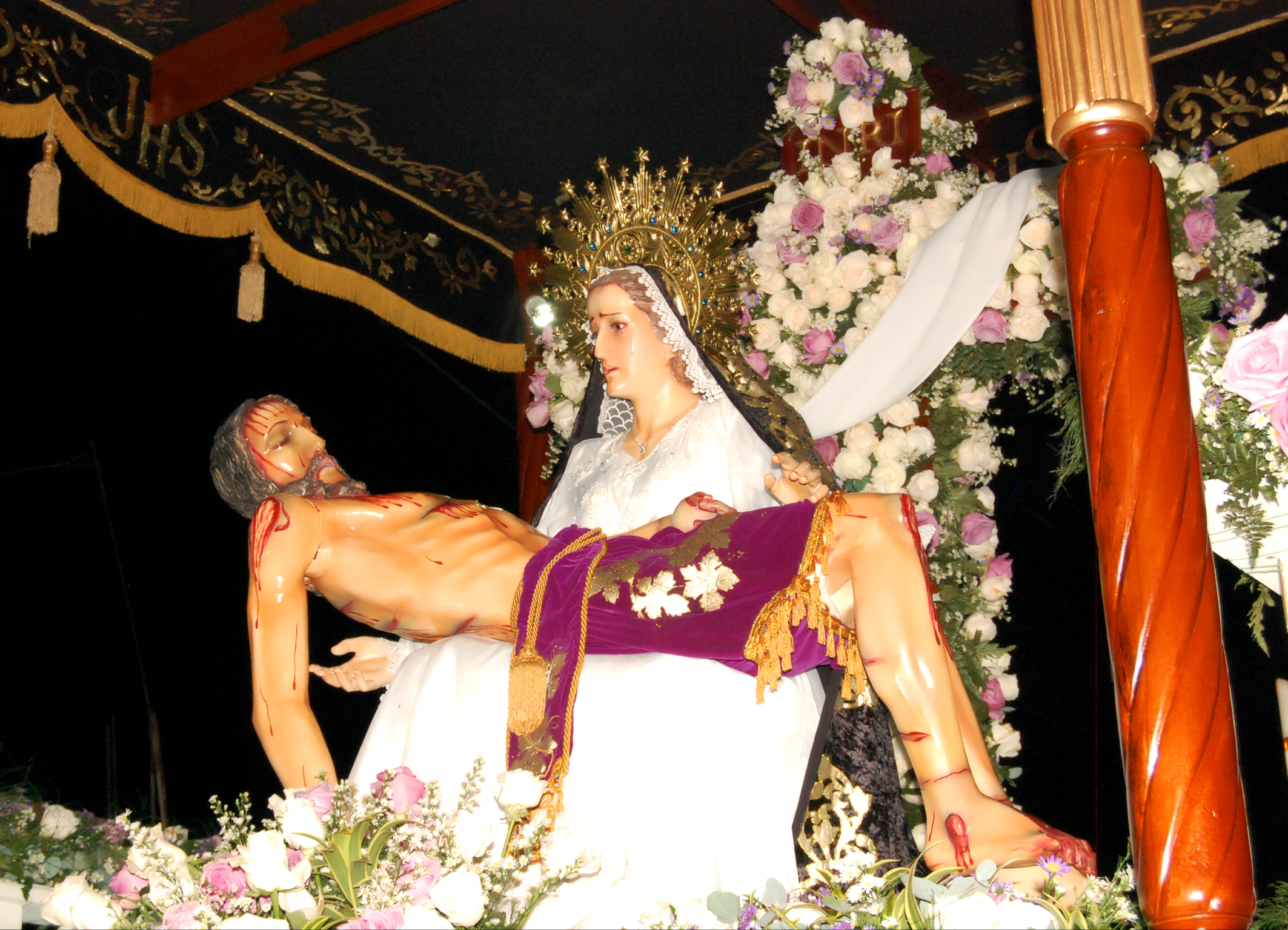 Immagine della Processione del Venerdì Santo a El Cerrito, Valle del Cauca Imagen de la Procesión del Viernes Santo a El Cerrito, Valle del Cauca